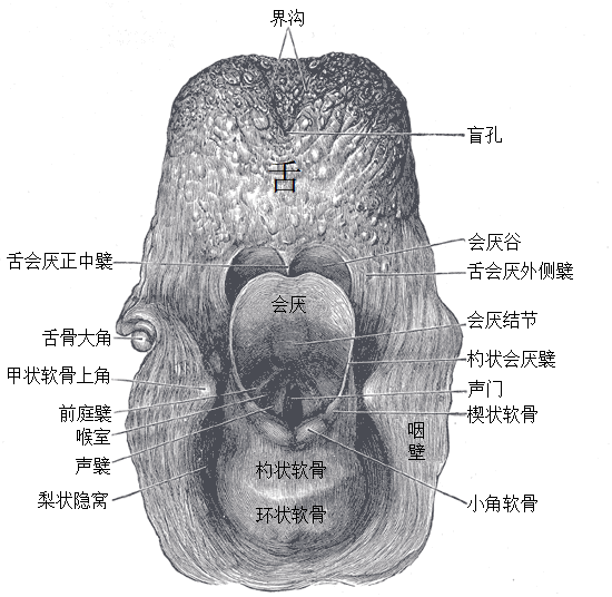 喉咙的入口，从后面看